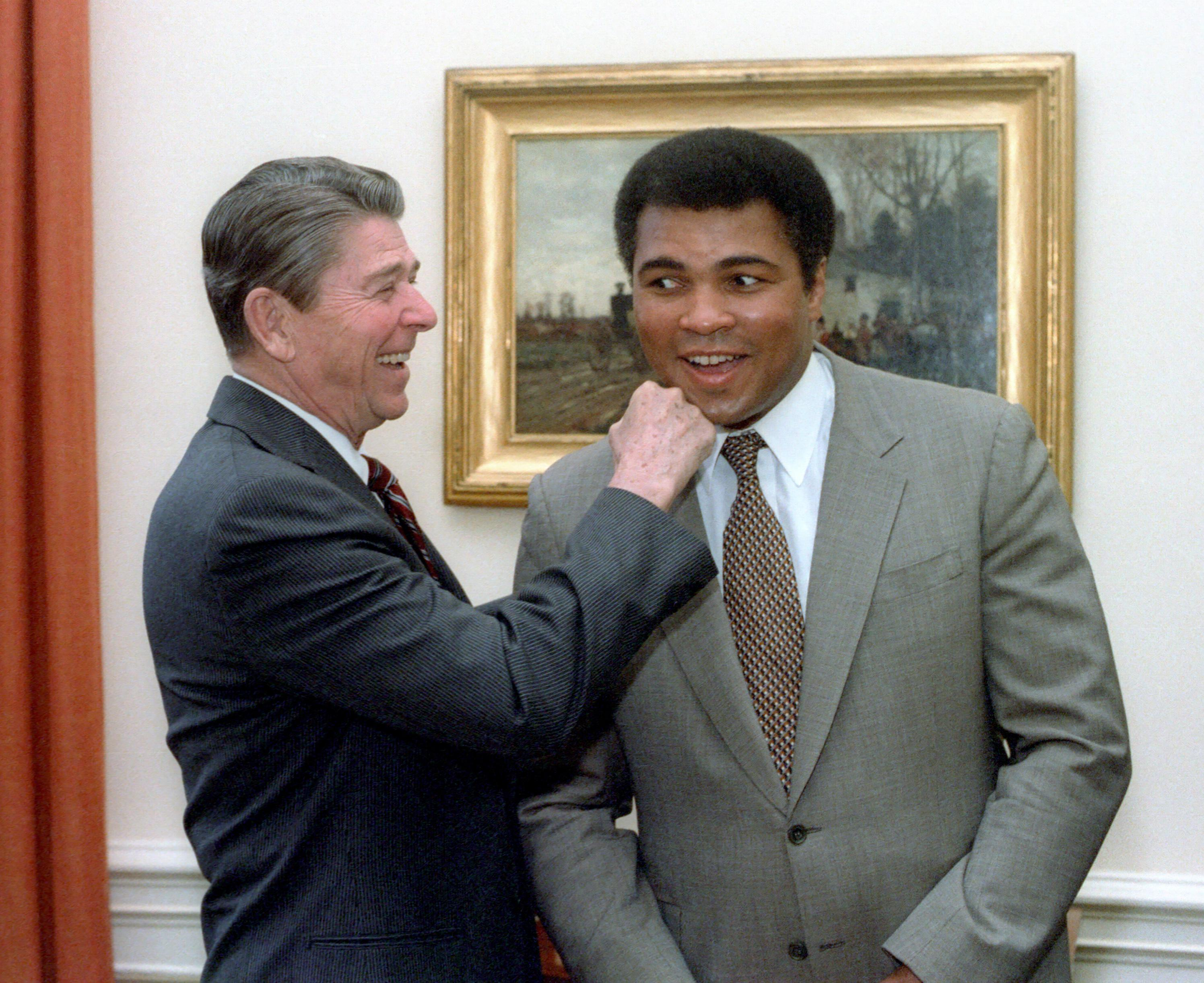 C12575-27A, President Reagan "punching" Muhammad Ali in the oval office.1/24/83